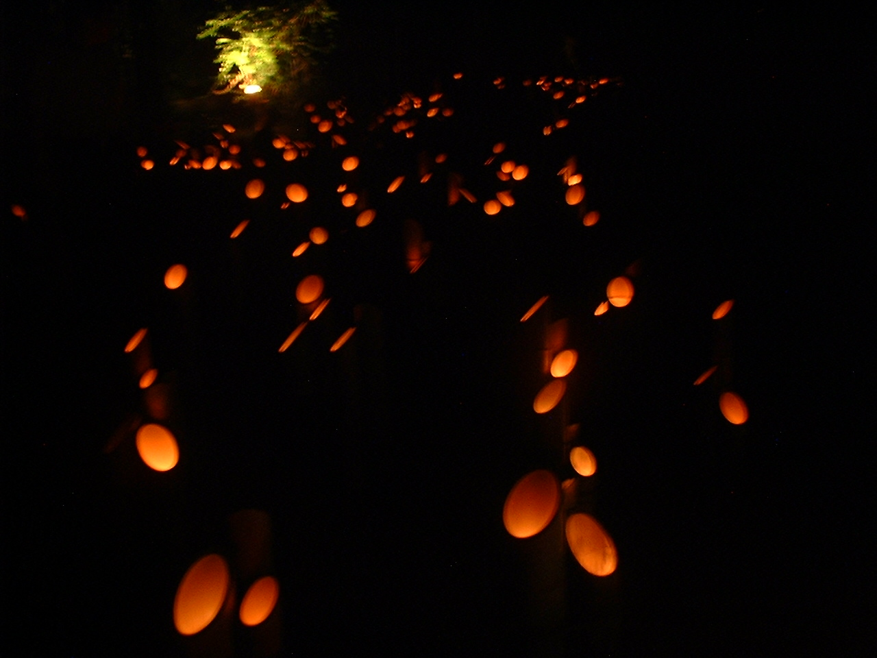 フラワーパークかごしまの竹とうろうを映した写真。